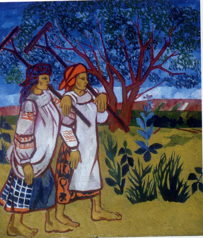 Бабы с граблями (холст, масло)